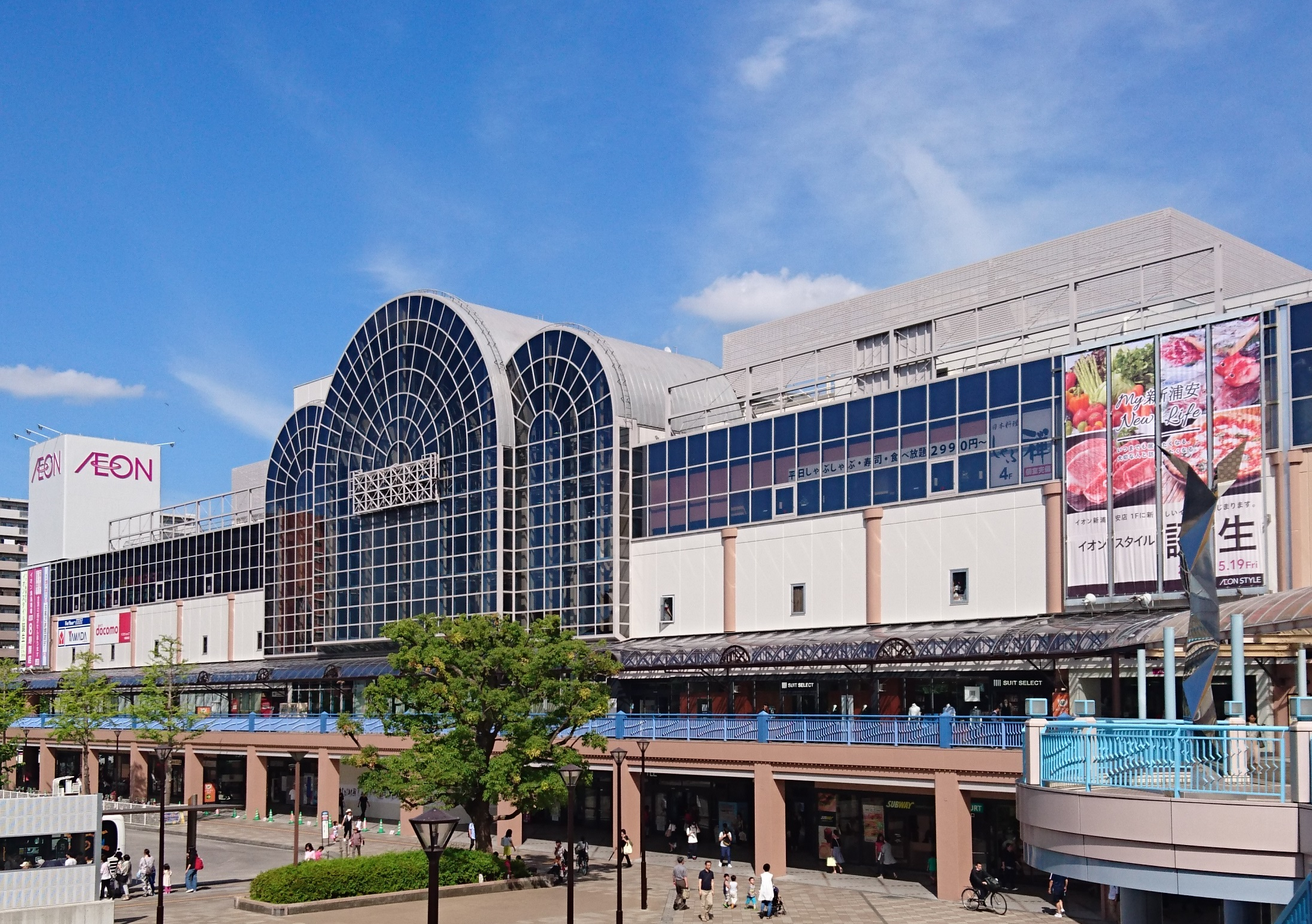 イオン新浦安店